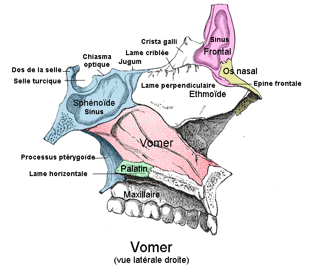 Vomer. Anatomie humaine